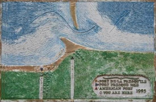 Plaque commémorative du Fort de la Presqu'île